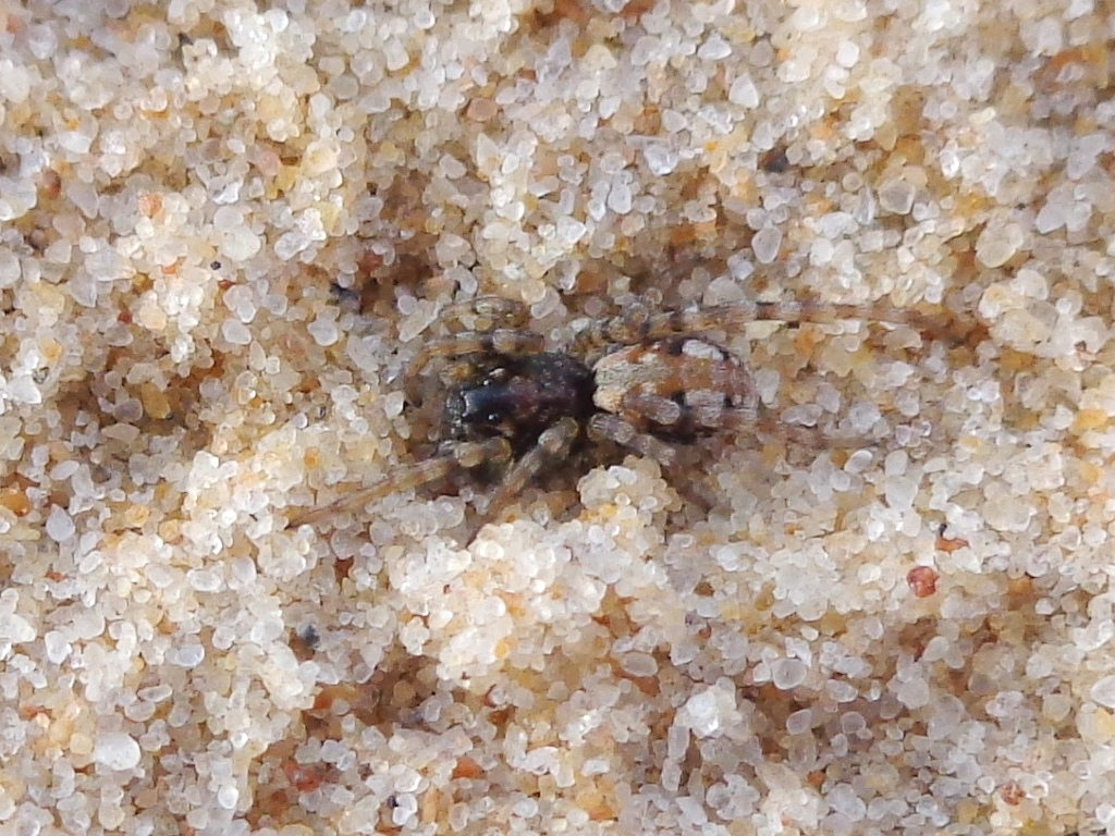 Arctosa perita. Found in Lilaste region, Latvia